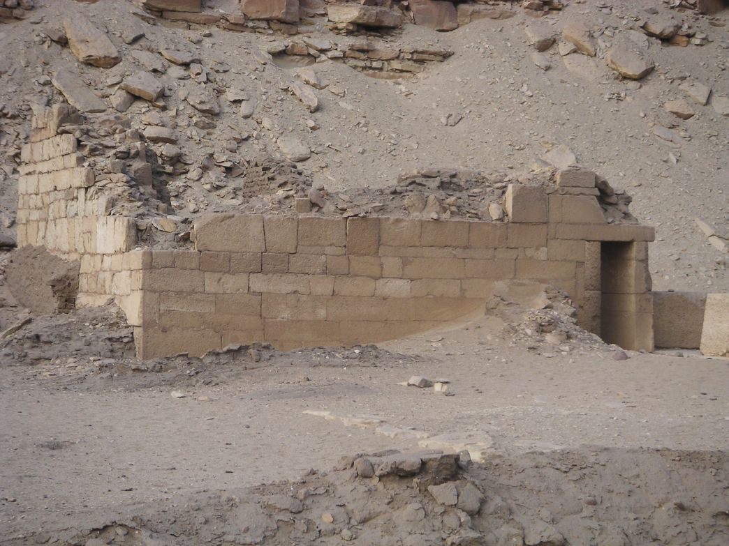 Chapelle du culte royal du temple funéraire de Néferirkarê - Ve dynastie égyptienne - Abousir